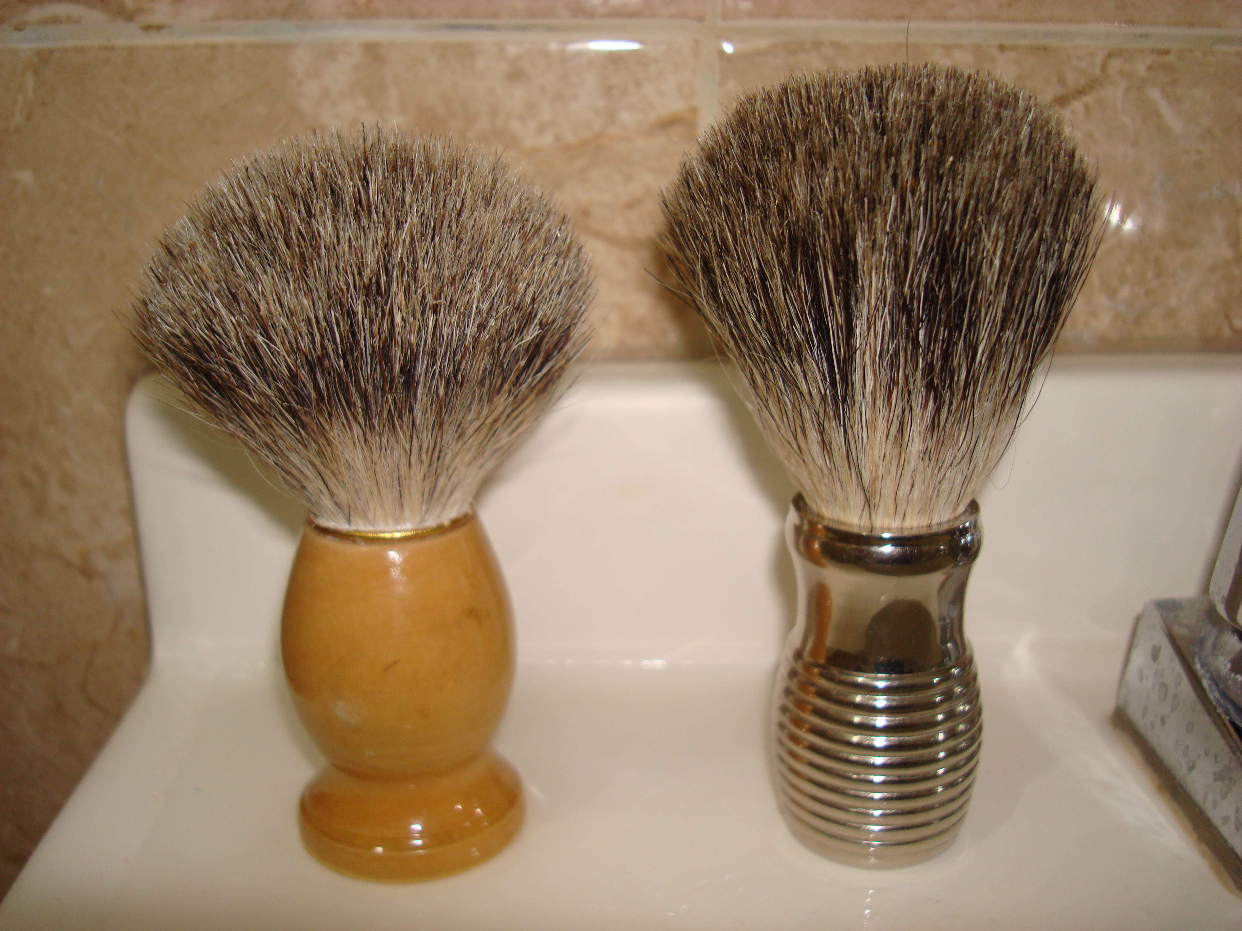 Brochas de afeitar de pelo de tejón con mangos de distintos materiales: madera y metal.